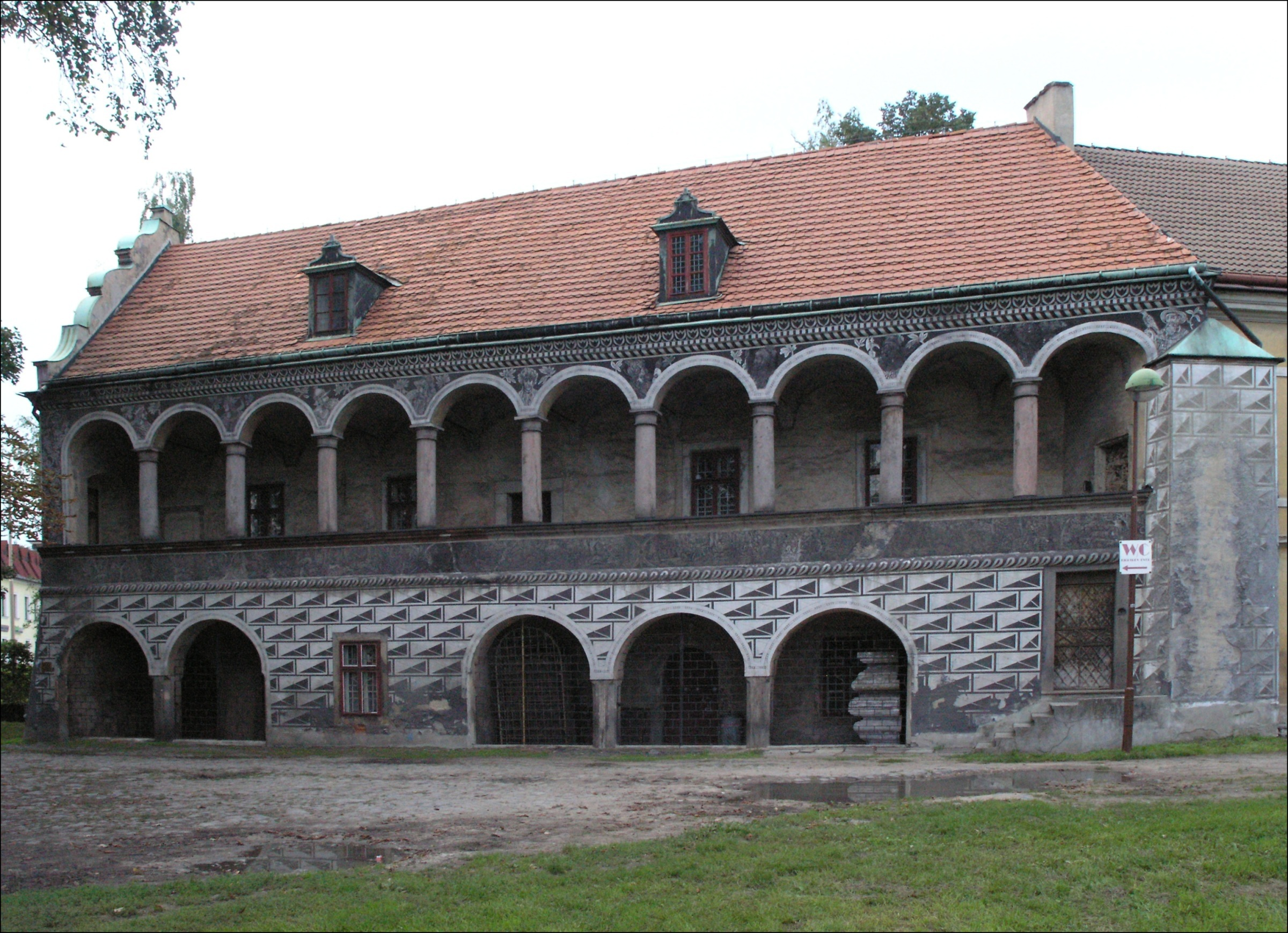 Česká Lípa - renesanční letohrádek Červený dům